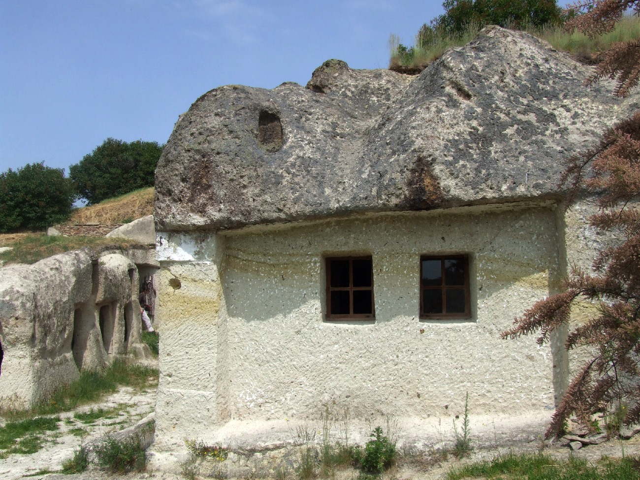 H1a, Noszvaj, Farkas-kő